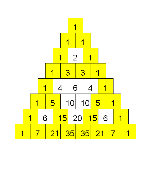 livello terzo della successione di quadrati tendente al triangolo di Sierpinski e sua coincidenza con triangolo di Taraglia in modulo 2. I dispari uguali a 1 modulo 2 sono colorati in giallo e corrispondono ai quadrati della costruzione sierpinskiana